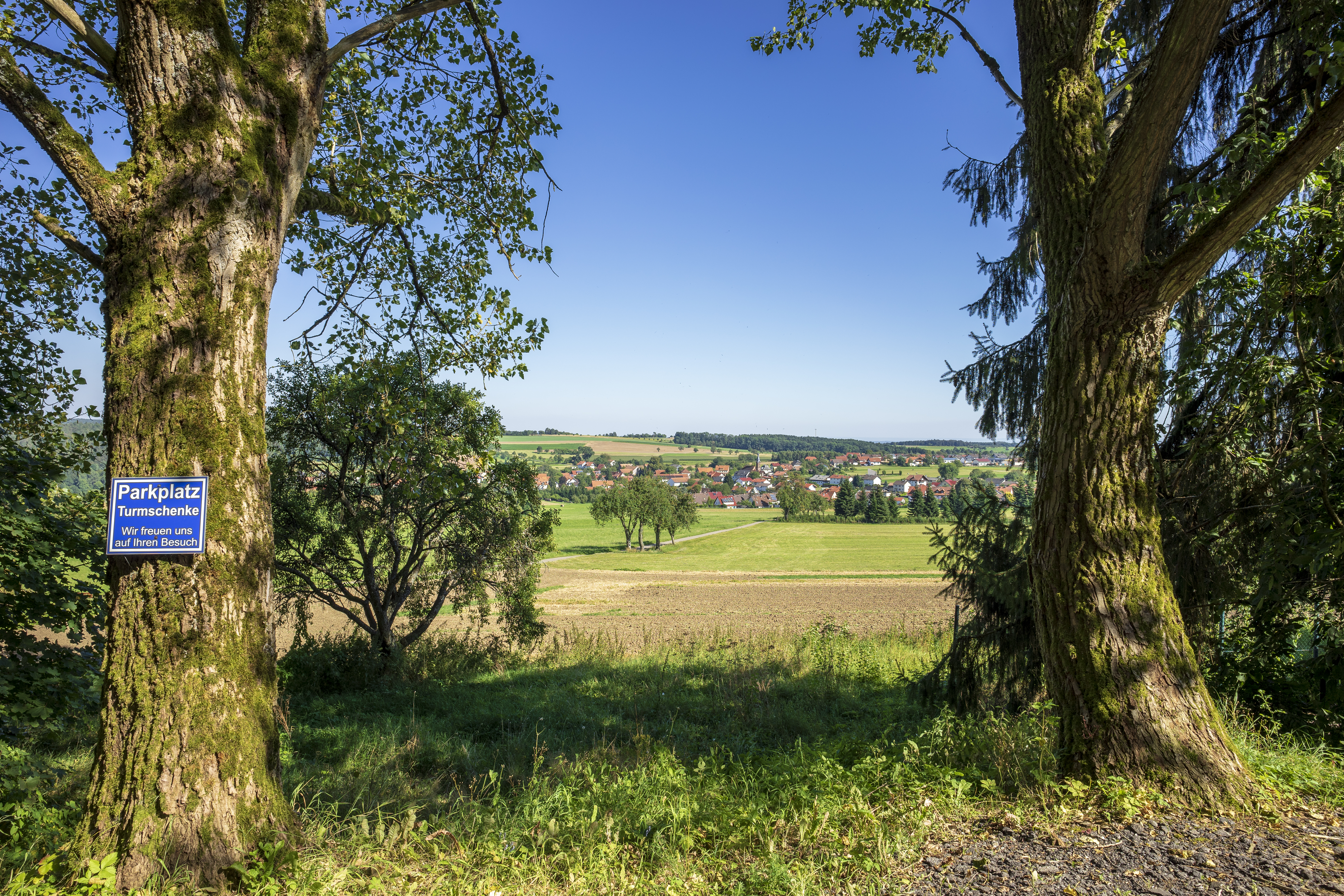 Waldbrunn (Odenwald): Blick vom Parkplatz am Südosthang des Katzenbuckels bei der Gaststätte Turmschenke über das Dorf Waldkatzenbach. Das Gebiet im Vordergrund zählt zum Landschaftsschutzgebiet „Winterhauch-Katzenbuckel“ (LSG 2.25.008).